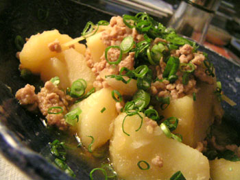 じゃがいもとひき肉のこっくり煮